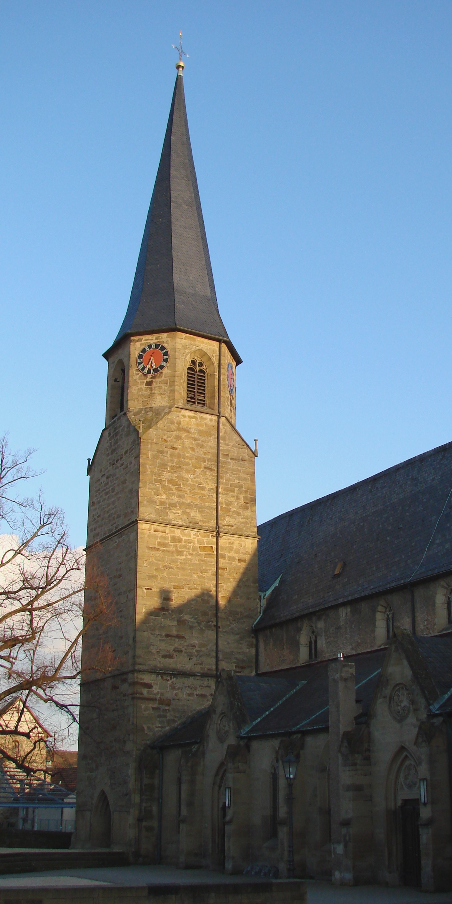 Bönnigheim, tower of St. Cyriakus church, 1280